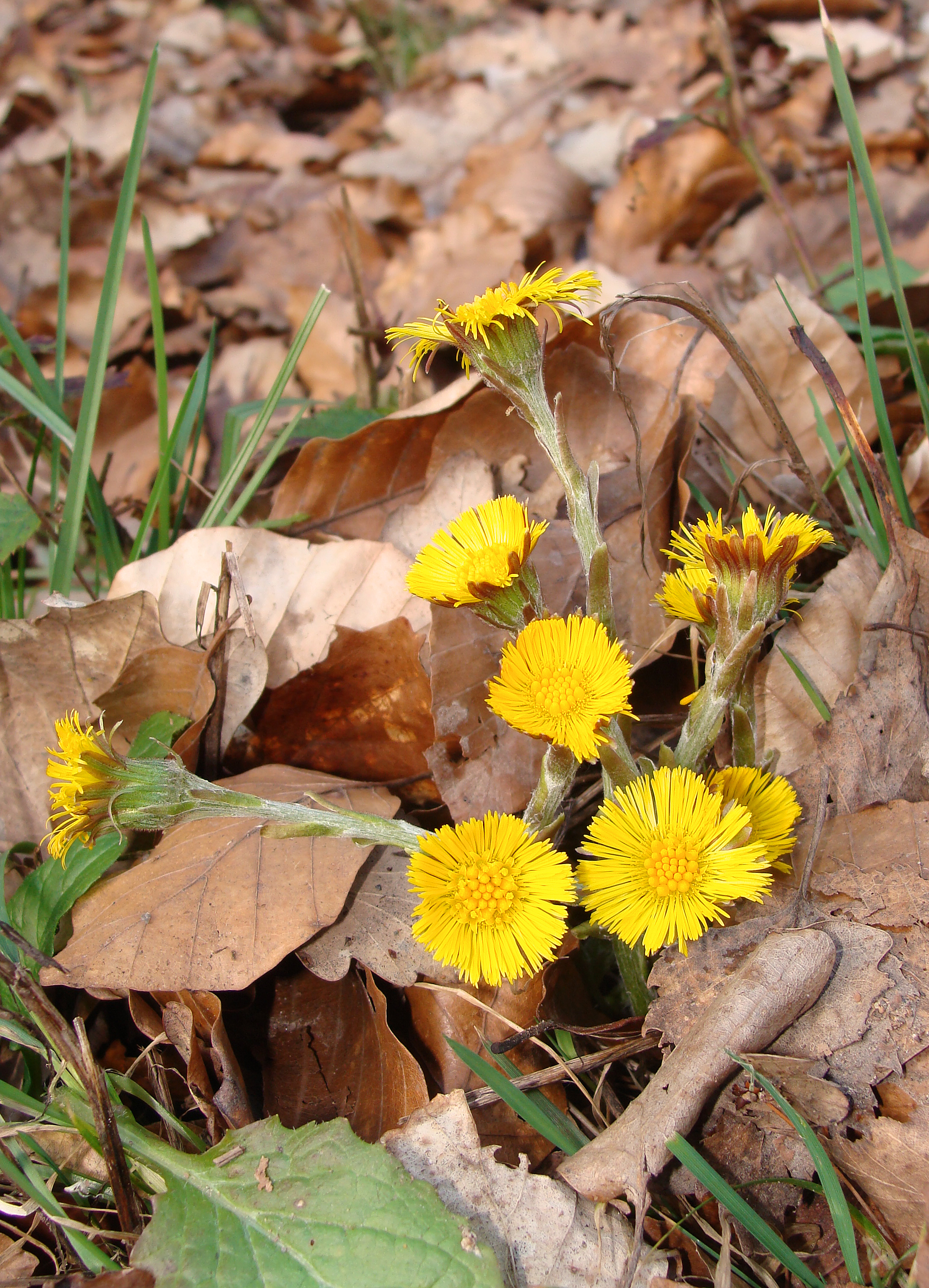 Tussilage, Tussilago farfara. Photographie prise en forêt de L'Hôpital (Moselle) le 5 mars 2014.